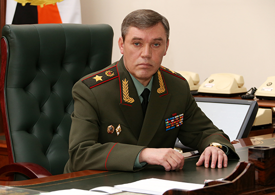 Начальник Генерального штаба Вооружённых Сил РФ Валерий Герасимов